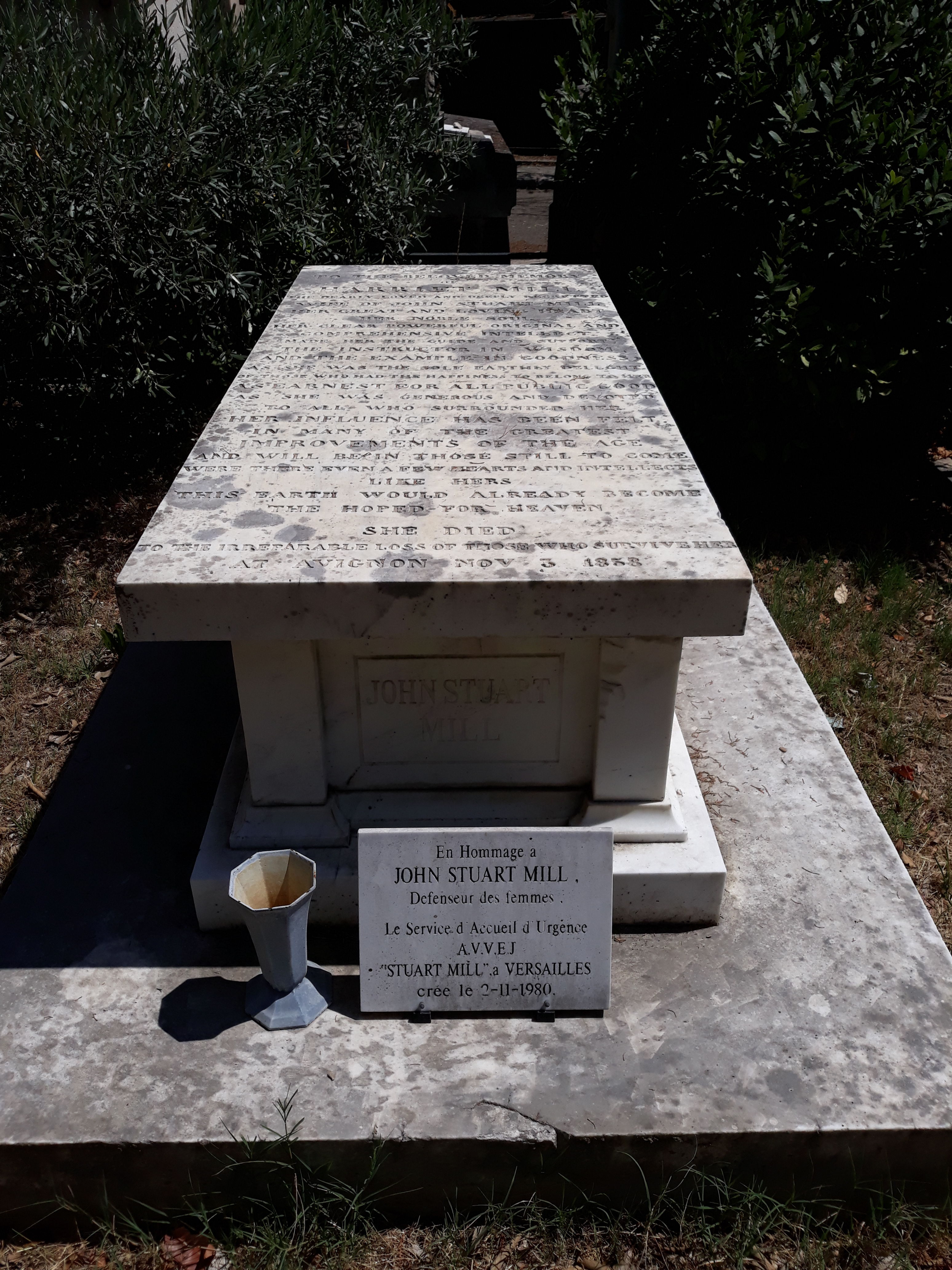 Das Grab der englischen Schriftstellerin und Frauenrechtlerin Harriet Taylor Mill im Grab ihres Mannes auf dem Cimetière Saint-Véran in Avignon.